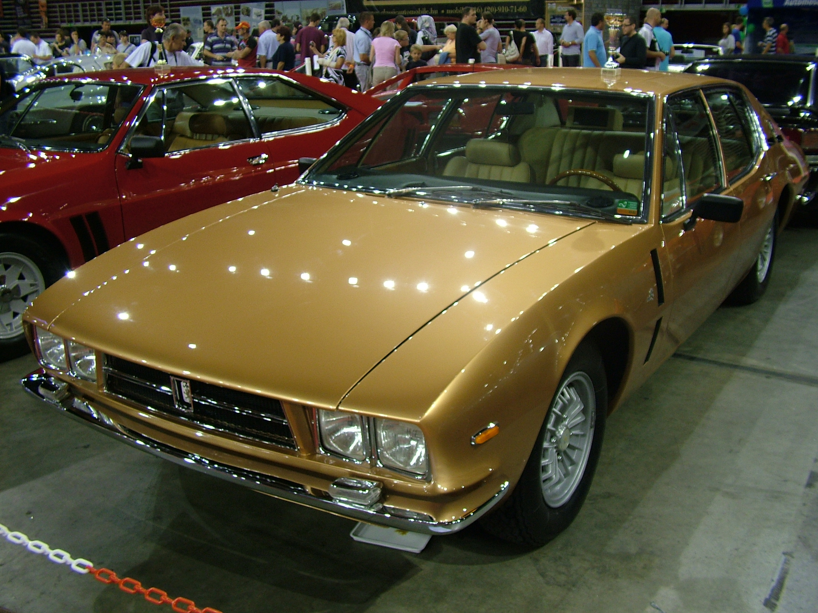 Iso Fidia